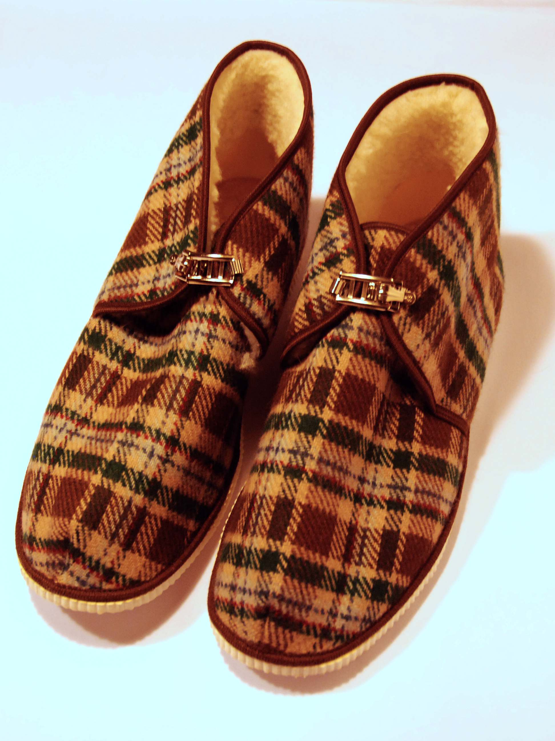 Bačkory zvané důchodky